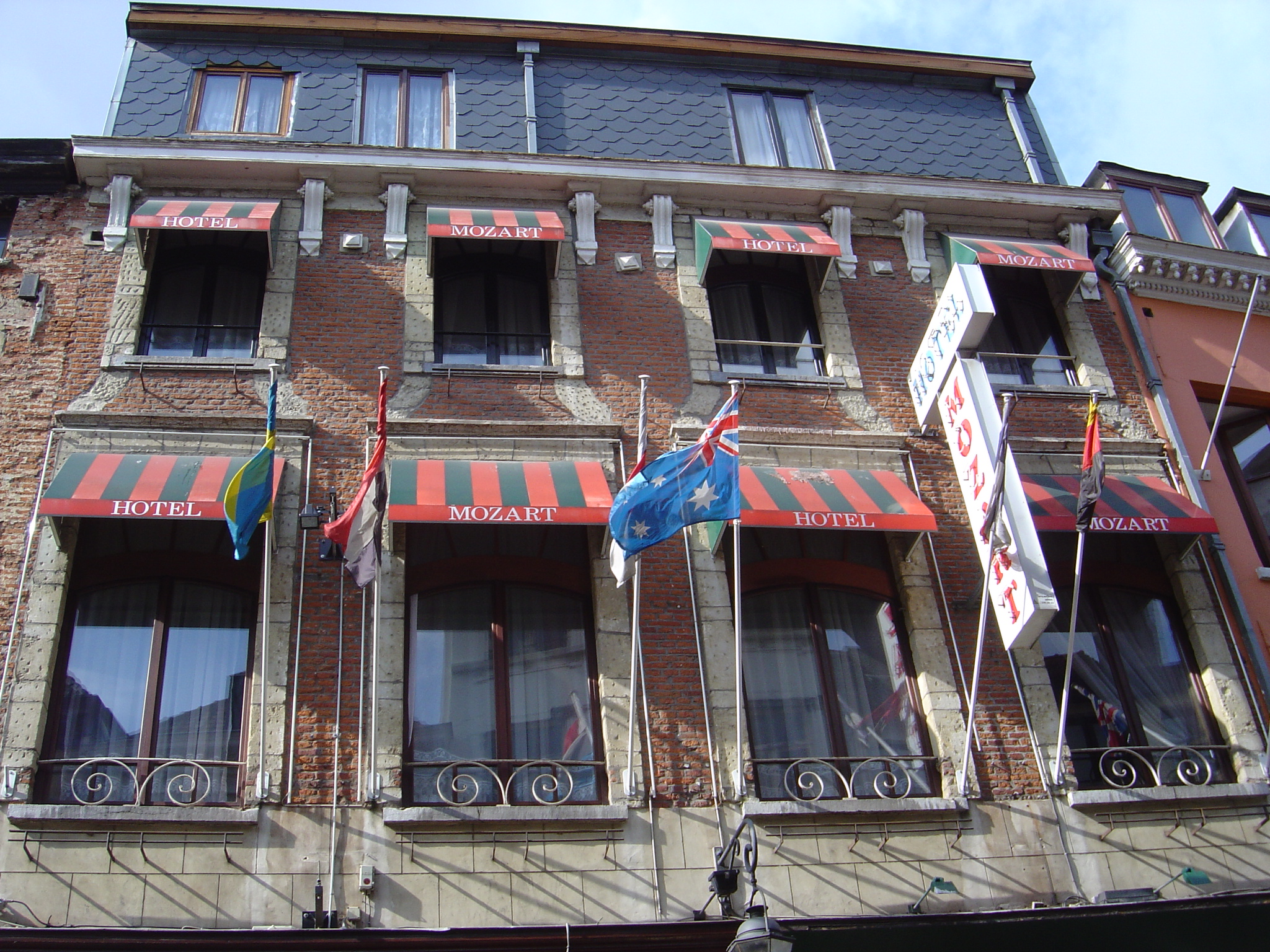 La maison du Marché au Fromage à Bruxelles, construite en 1709 et appelée "Den Eyseren Draeck", ou "au Dragon de Fer", actuel numéro 15-17. La "nouvelle, grande et belle maison" nommée au Dragon de Fer ou den Eyseren Draeck, construite en 1709, actuel 15-17 du Marché au Fromage à Bruxelles. Le rez-de-chaussée a été défiguré en 1882 pour en faire un espace commercial, on y voyait jadis au XVIIIème siècle, des boiseries avec des peintures encastrées et des cuirs dorés dans la pièce avant du rez-de-chaussée vers la rue. Sur la façade pendait comme enseigne un dragon de fer.